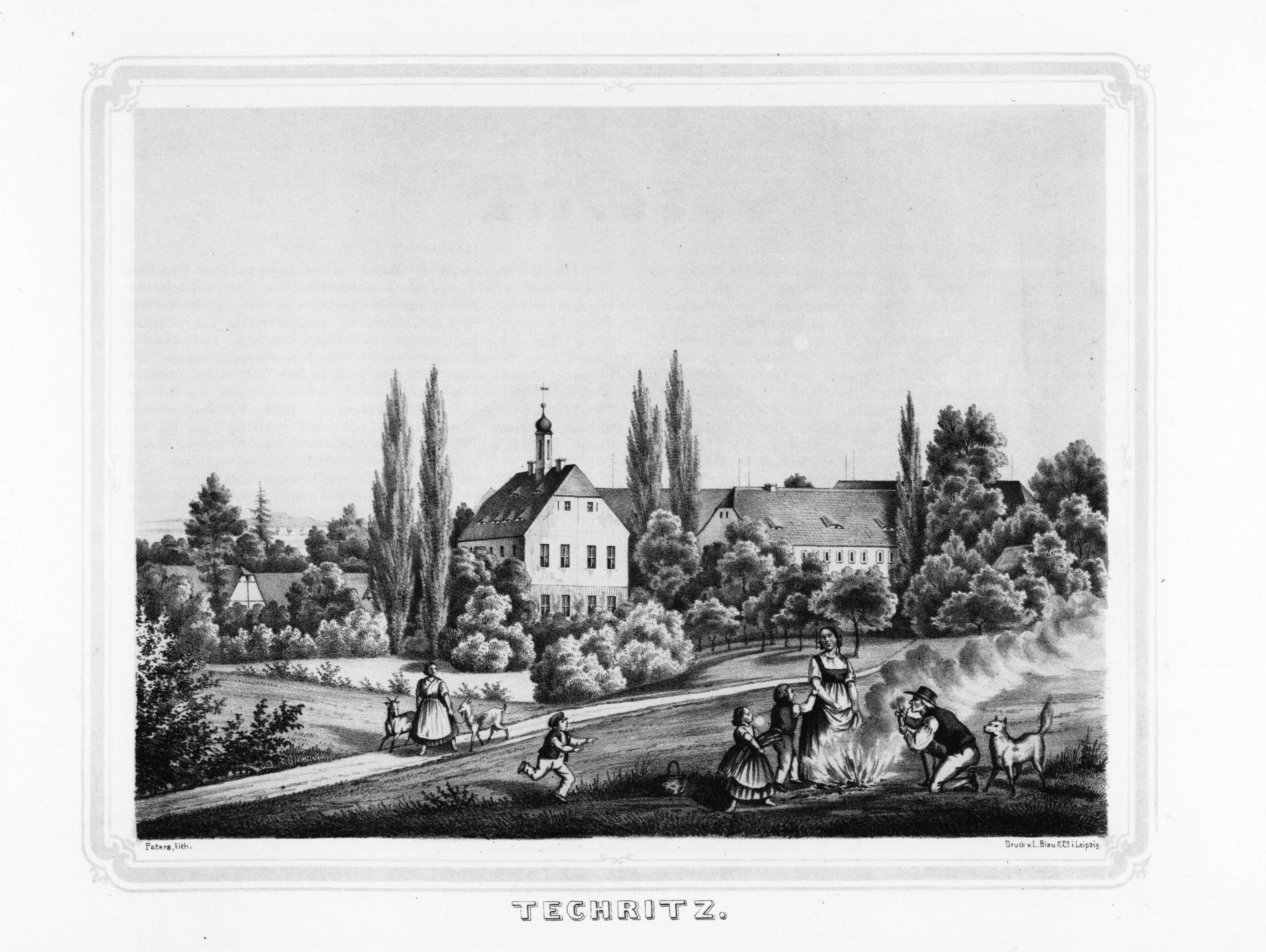 Techritz aus: Album der Rittergüter und Schlösser im Königreiche Sachsen Markgrafenthum Oberlausitz Section: III